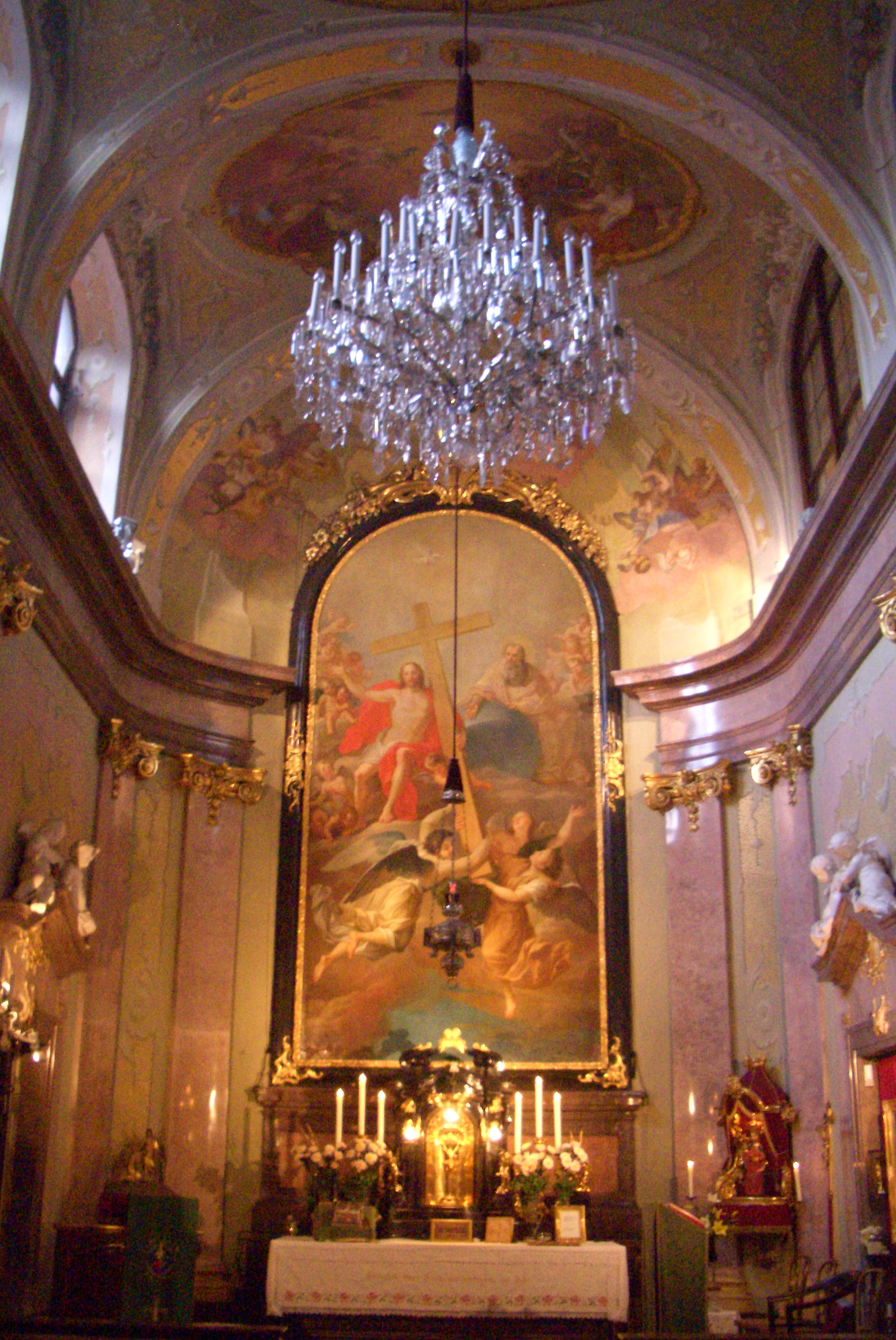 Gesamteindruck der Schloßkirche Hetzendorf - Allerheiligste Dreifaltigkeit - Seliger Kaiser Karl Gedächtniskirche im Jahr 2007.